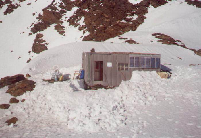 Vue du refuge